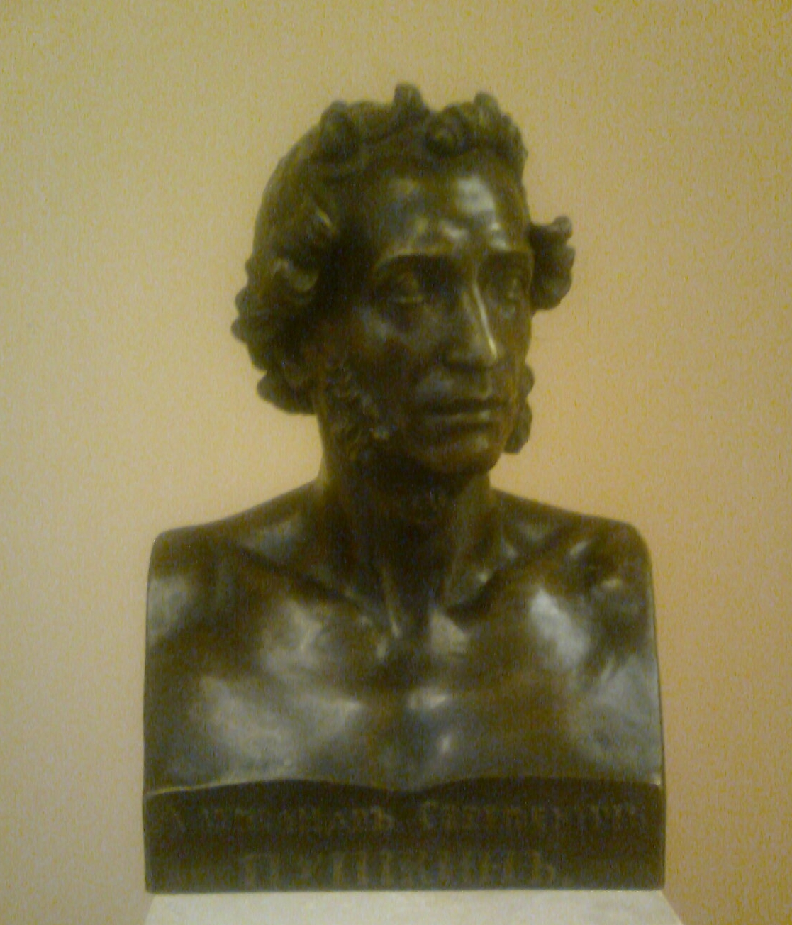 Михайловский замок.